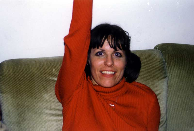 Lisa Carver, 1999